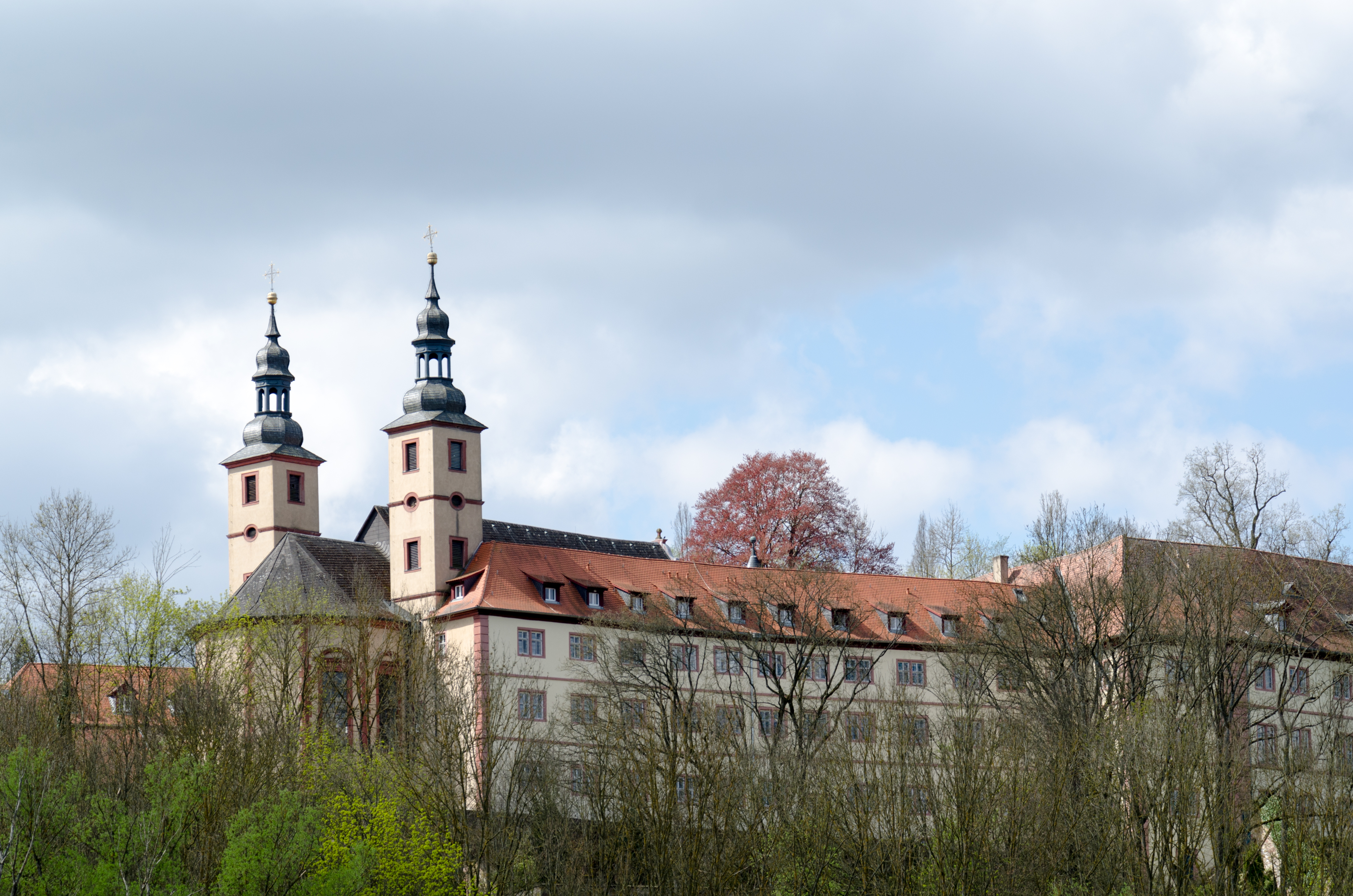 Triefenstein, Trennfeld, Am Klosterberg